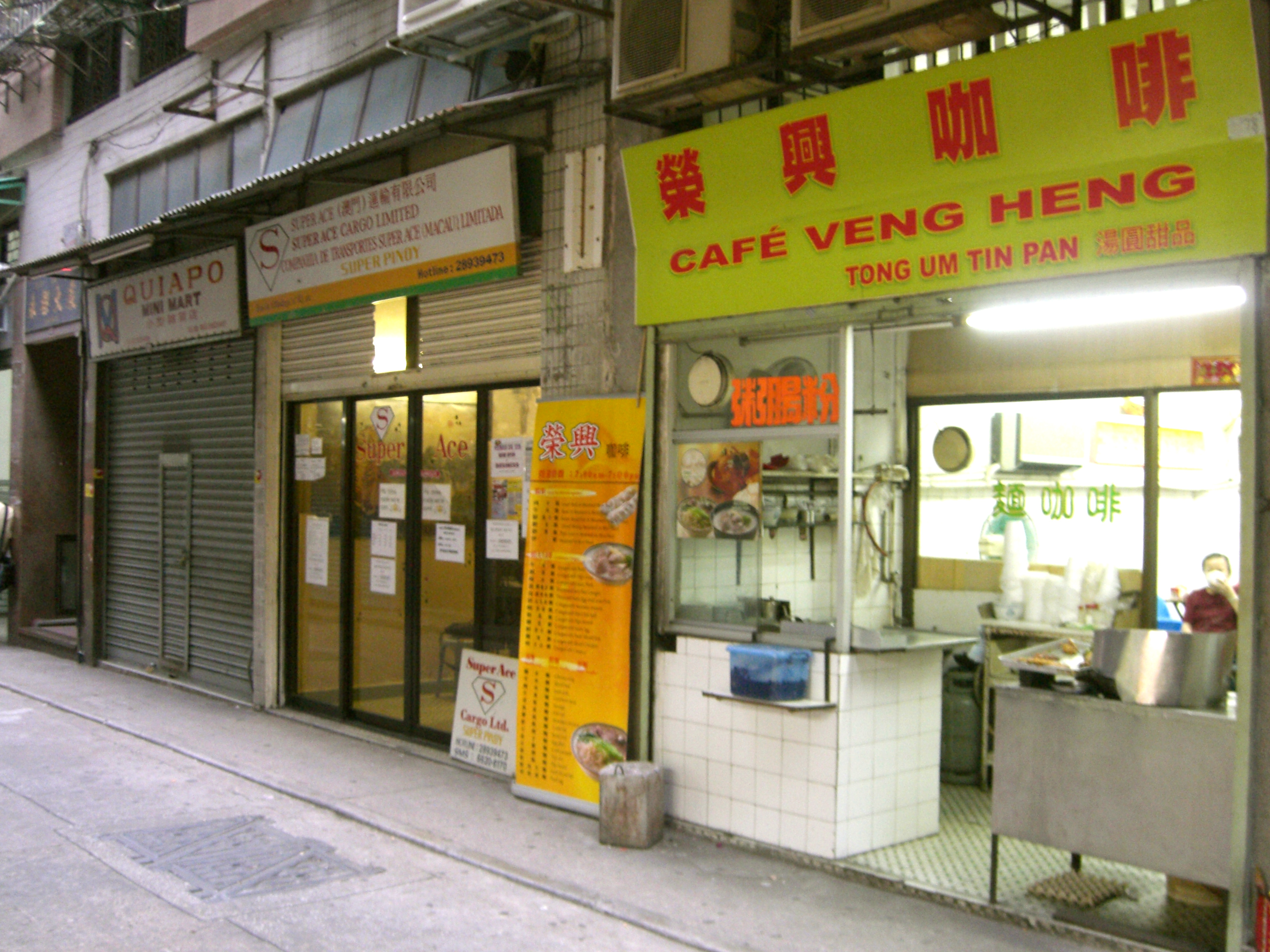 Rua da Alfândega